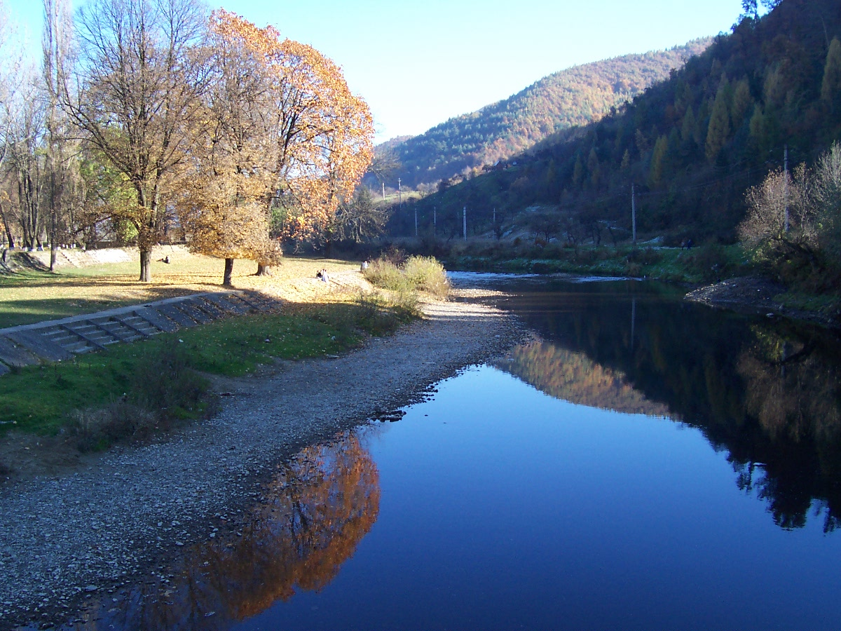 Az Iza folyó Máramarosszigetnél